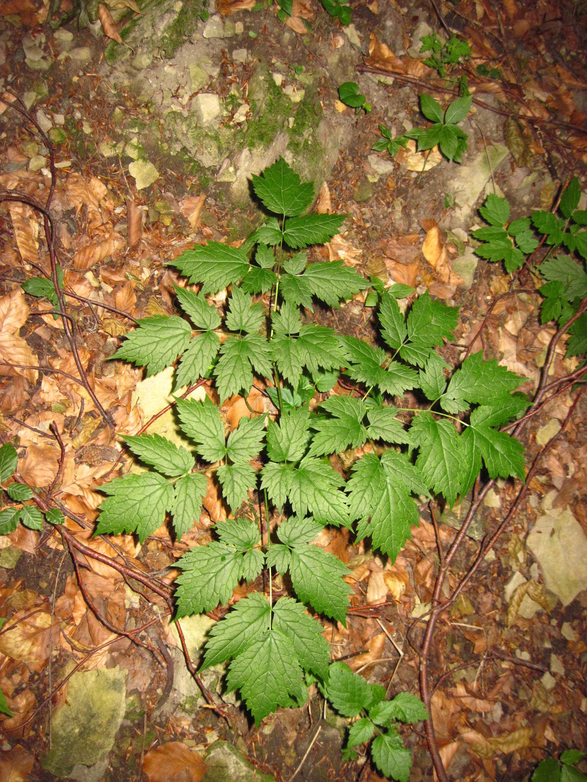 Samorostlík klasnatý (Actaea spicata), jihovýchodní část PR Project: Chráněná území.